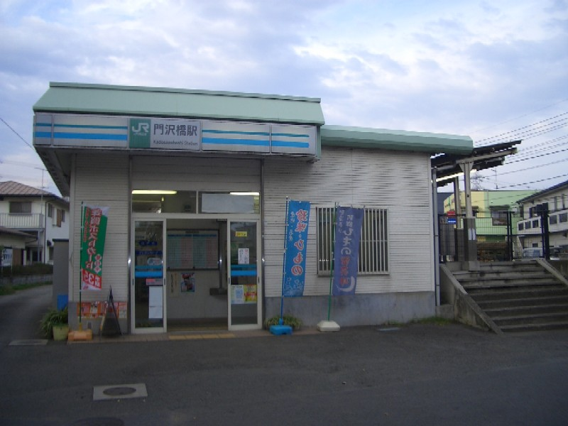 Kadosawabashi Station on JR Sagami Line, Ebina, Kanagawaja:門沢橋駅